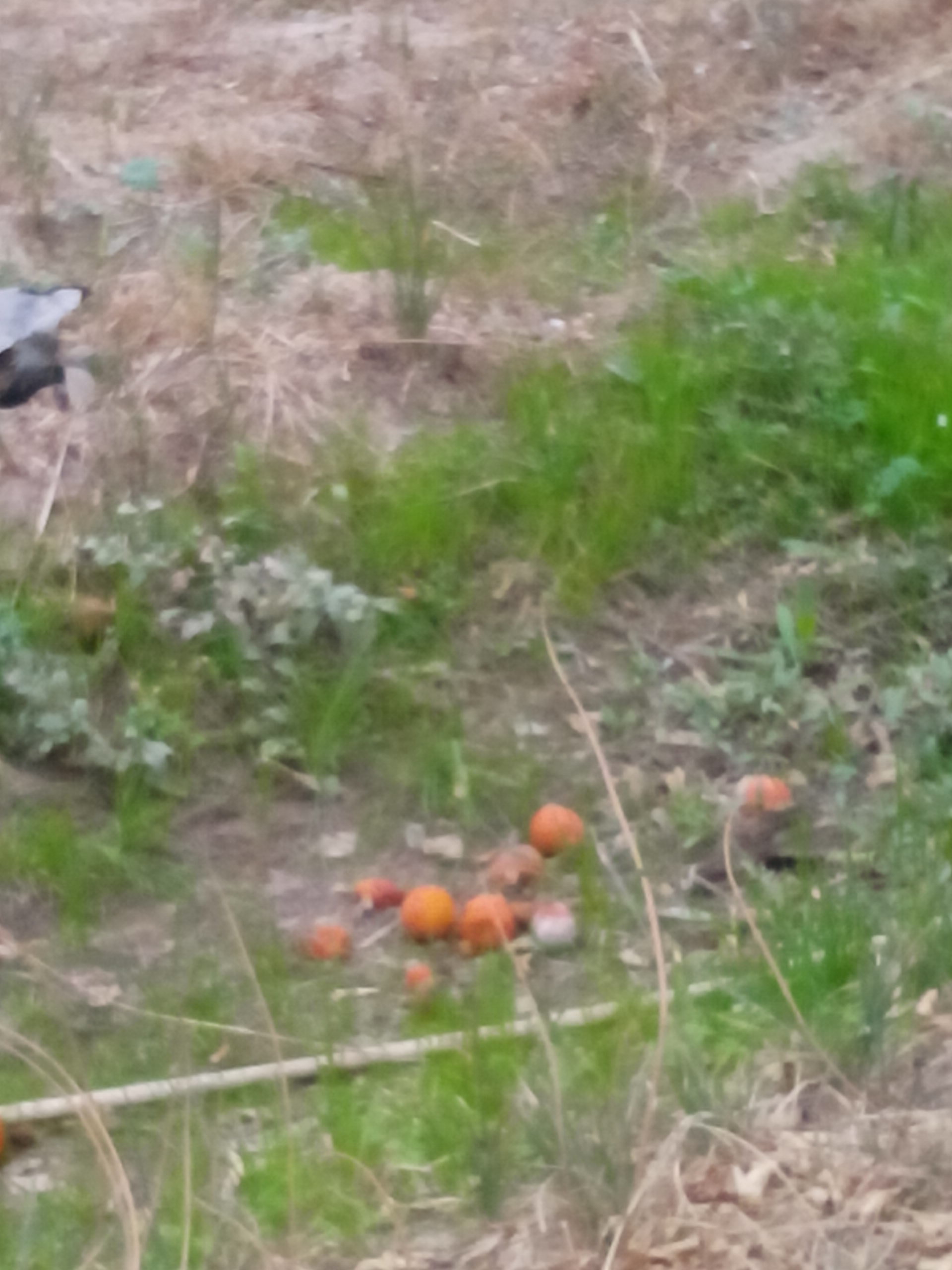 عفن الفواكه يظهر على بعض ثمار الفواكه المتروكة على الأرض في بستان بمدينة الخالص في العراق